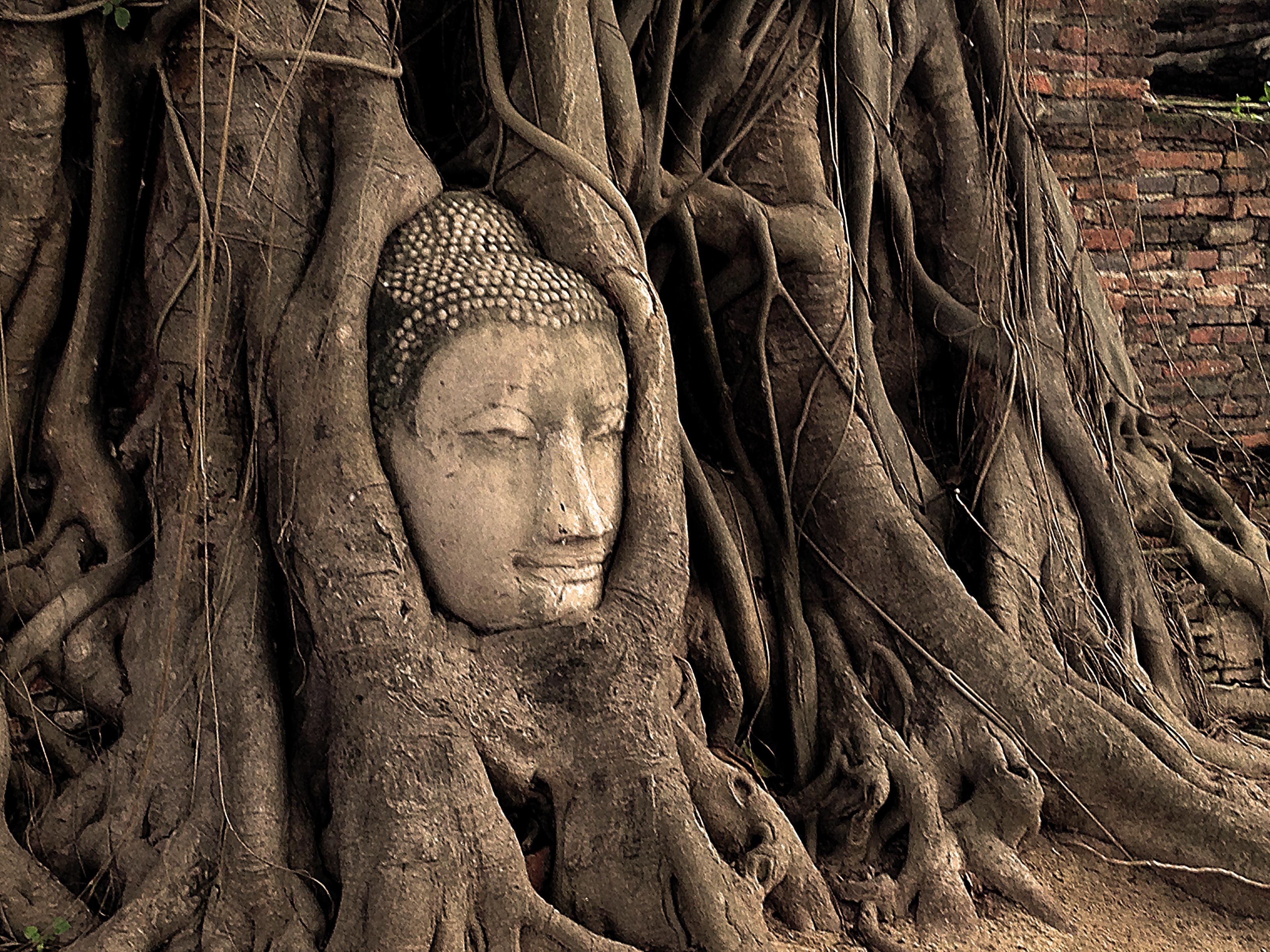 วัดมหาธาตุ เศียรพระในต้นไม้ใหญ่